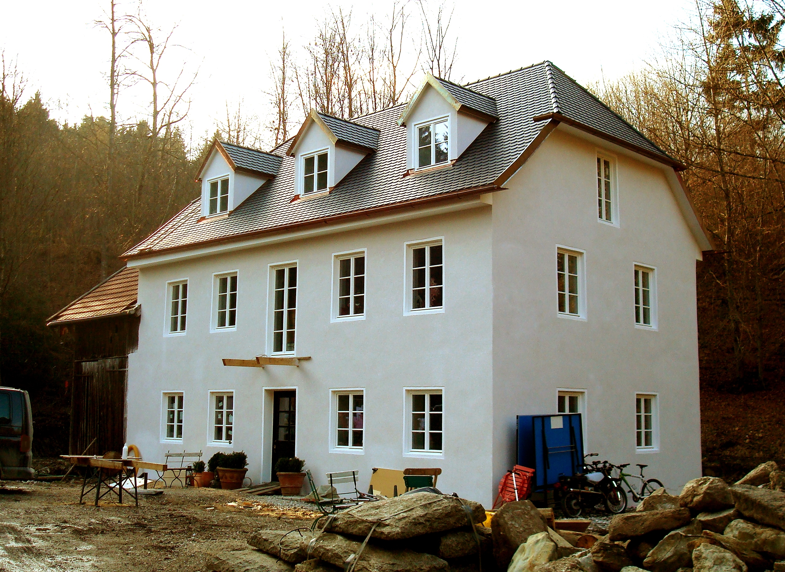 Berg am Starnberger See, OT Harkirchen, Manthal-Hammer. Der zweigeschossige Halbwalmdachbau der ehemaligen Hammerschmiede entstand am Anfang des 19. Jahrhunderts.